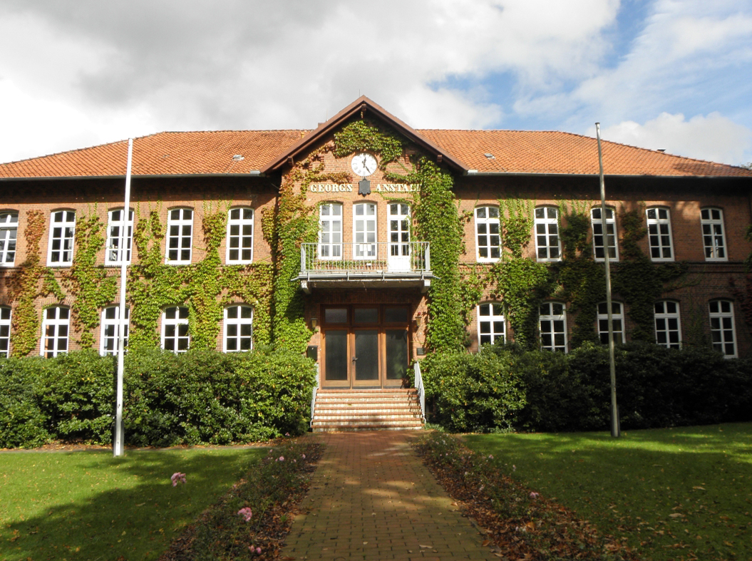 Ebstorf 2011 OLYMPUS DIGITAL CAMERA